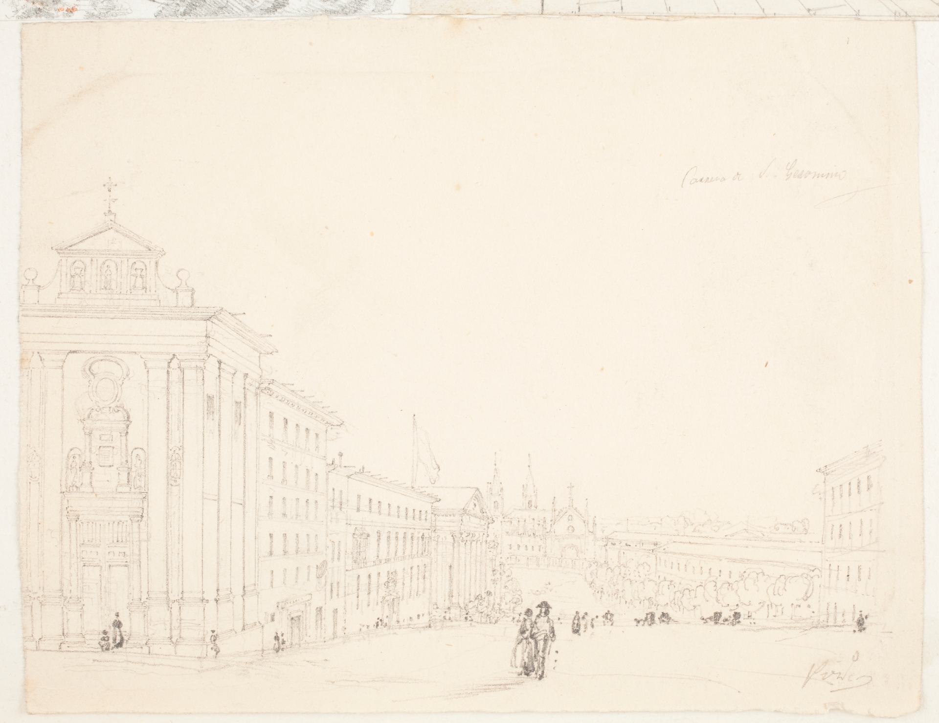 Vista de la carrera de San Jerónimo desde la iglesia del Hospital de los italianos en Madrid (1840-1873). Lápiz compuesto sobre papel avitelado. Museo del Prado, Madrid, España